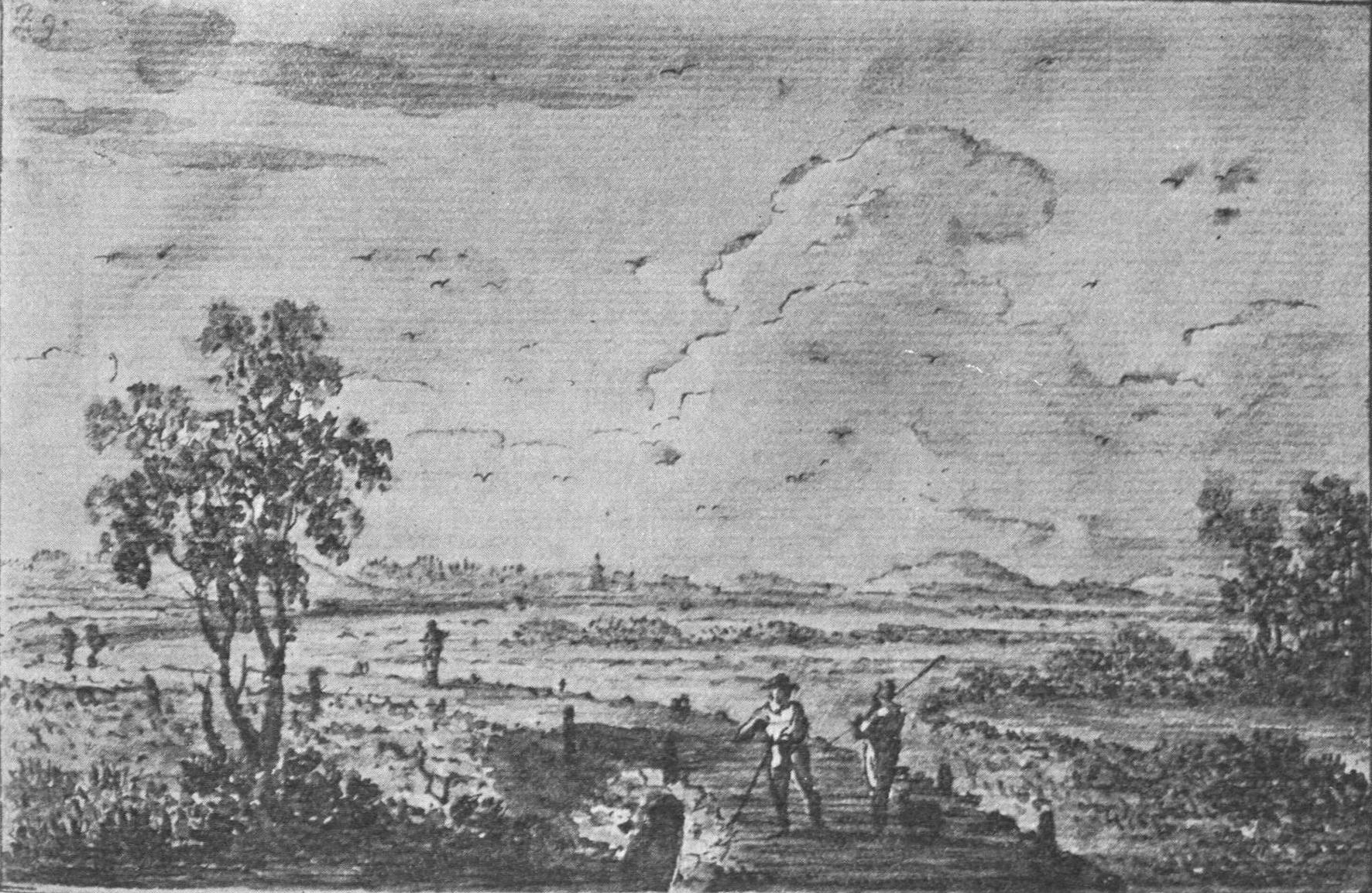 Беларуская (тарашкевіца): Пінскія балоты паміж Дольскам (Dolsk) і Мокрым (Mokraje)